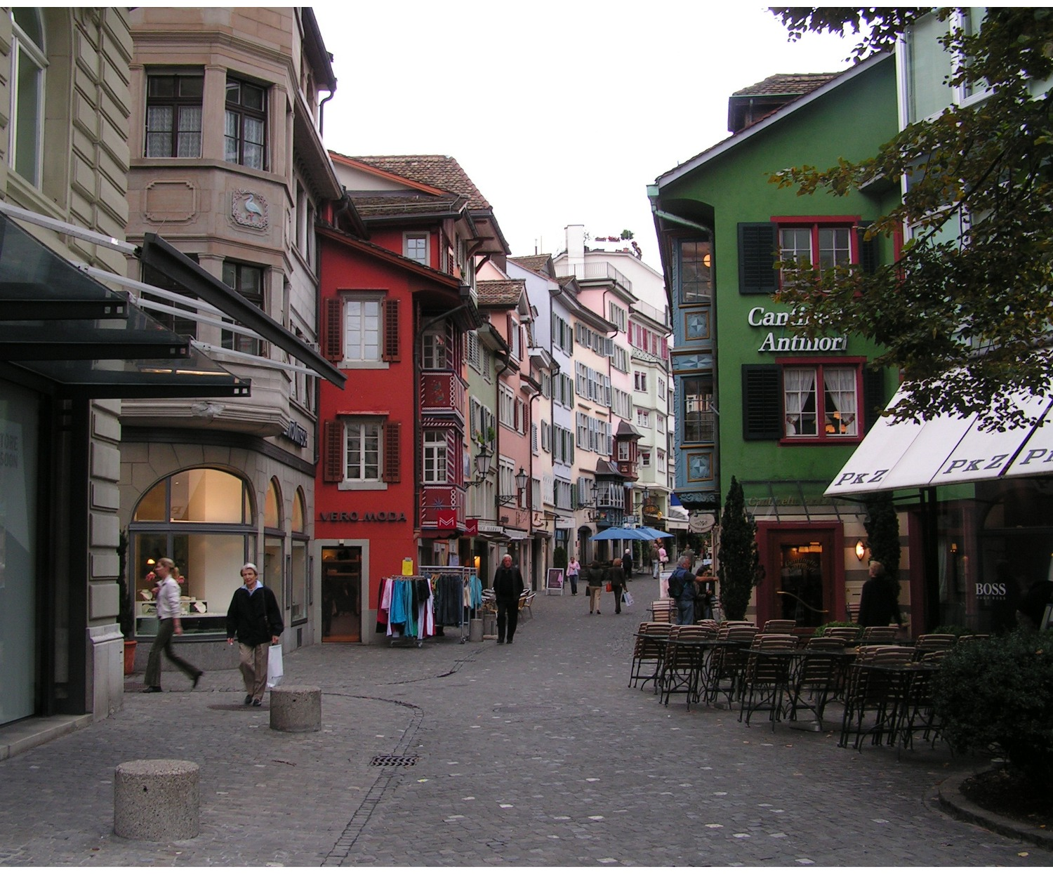 2004.09.15. Ciuricho gatvės